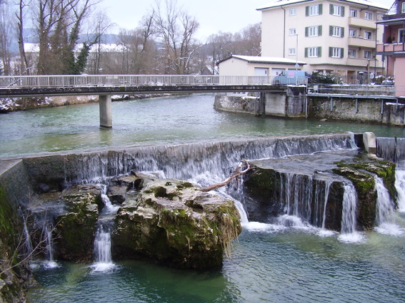 selbst fotografiert (19.02.2005), Keimzelle/David Croll da ich es selbst fotografiert habe und es wikipedia spende, setze ich es unter die GNU-FDL... allenfalls könnte der architekt der brücke etwas gegen die FDL-Lizenz haben *grins* oder eben die enten auf dem bild...Keimzelle 16:34, 20. Feb 2005 (CET)